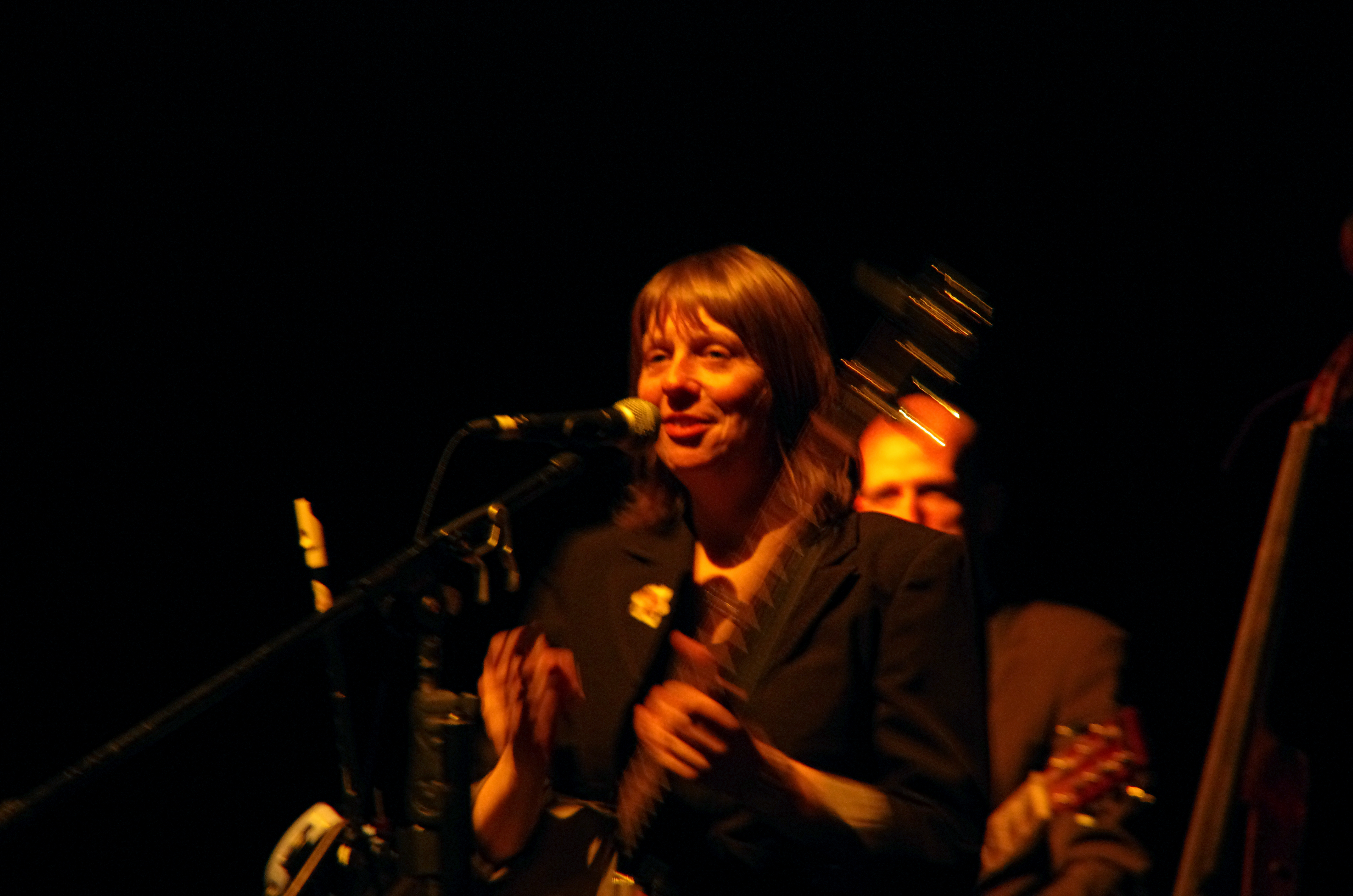 Corbie (Somme, France) - Soirée de 2 concerts dans la salle "Les Docks" pour la fête de Saint-Patrick. Les Churchfitters sont sur scène.